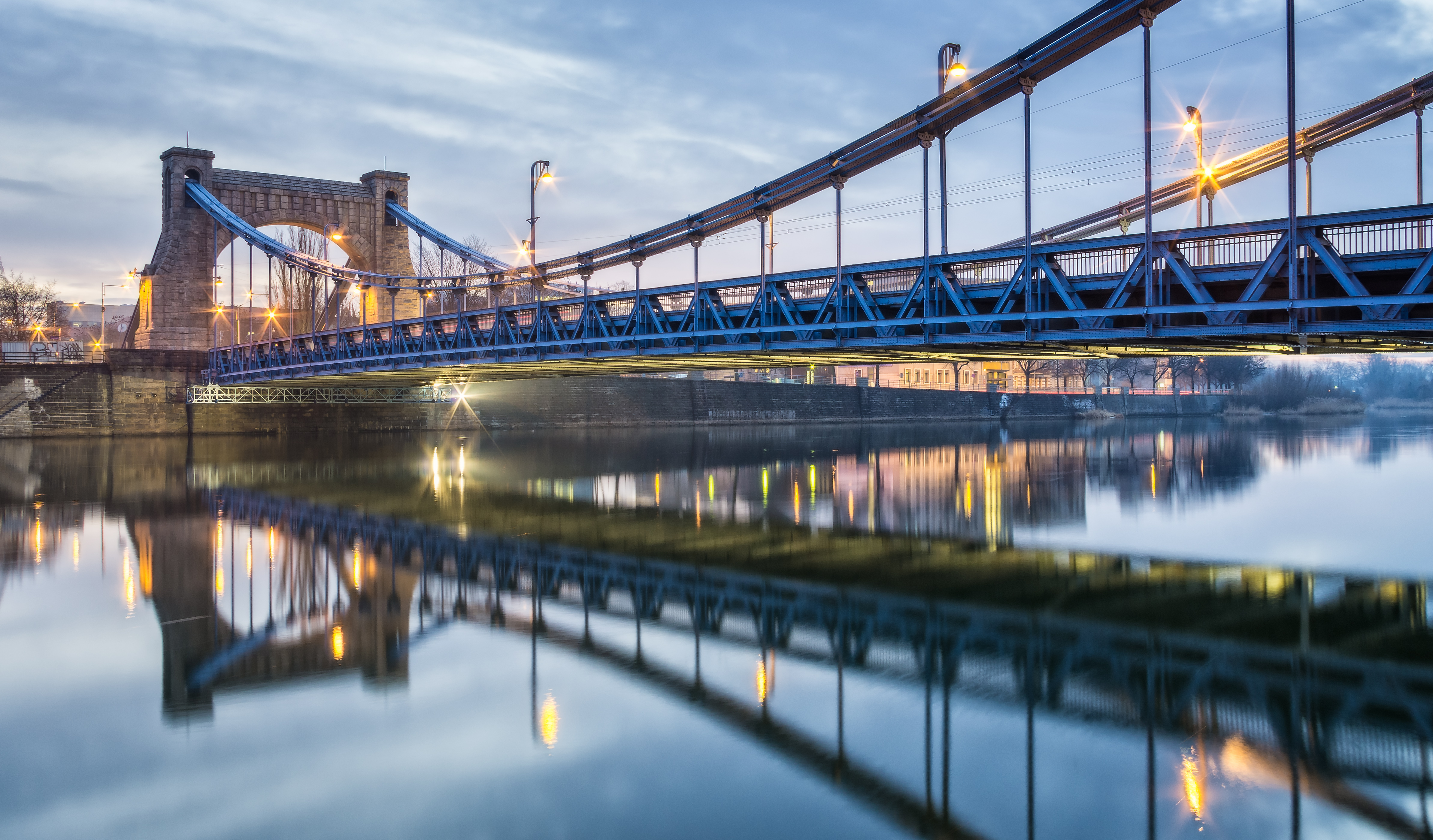 Wrocław, Most Grunwaldzki, 1907